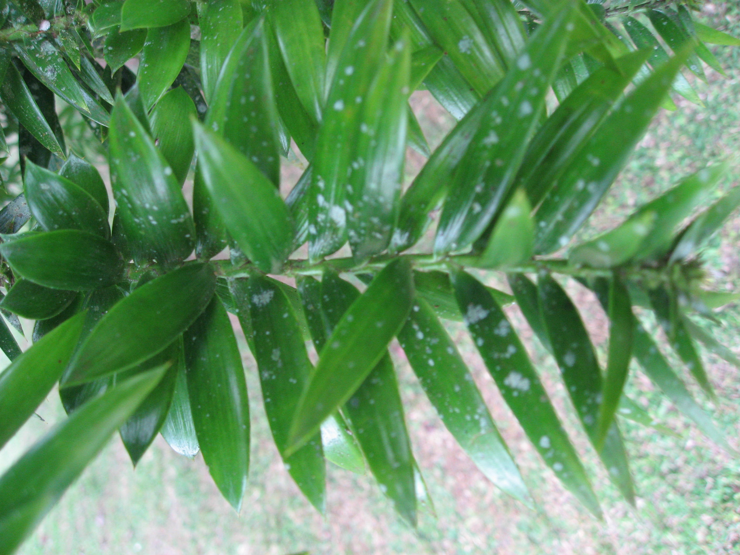 Araucaria bidwillii in Kebun Raya Bali Botanic Garden